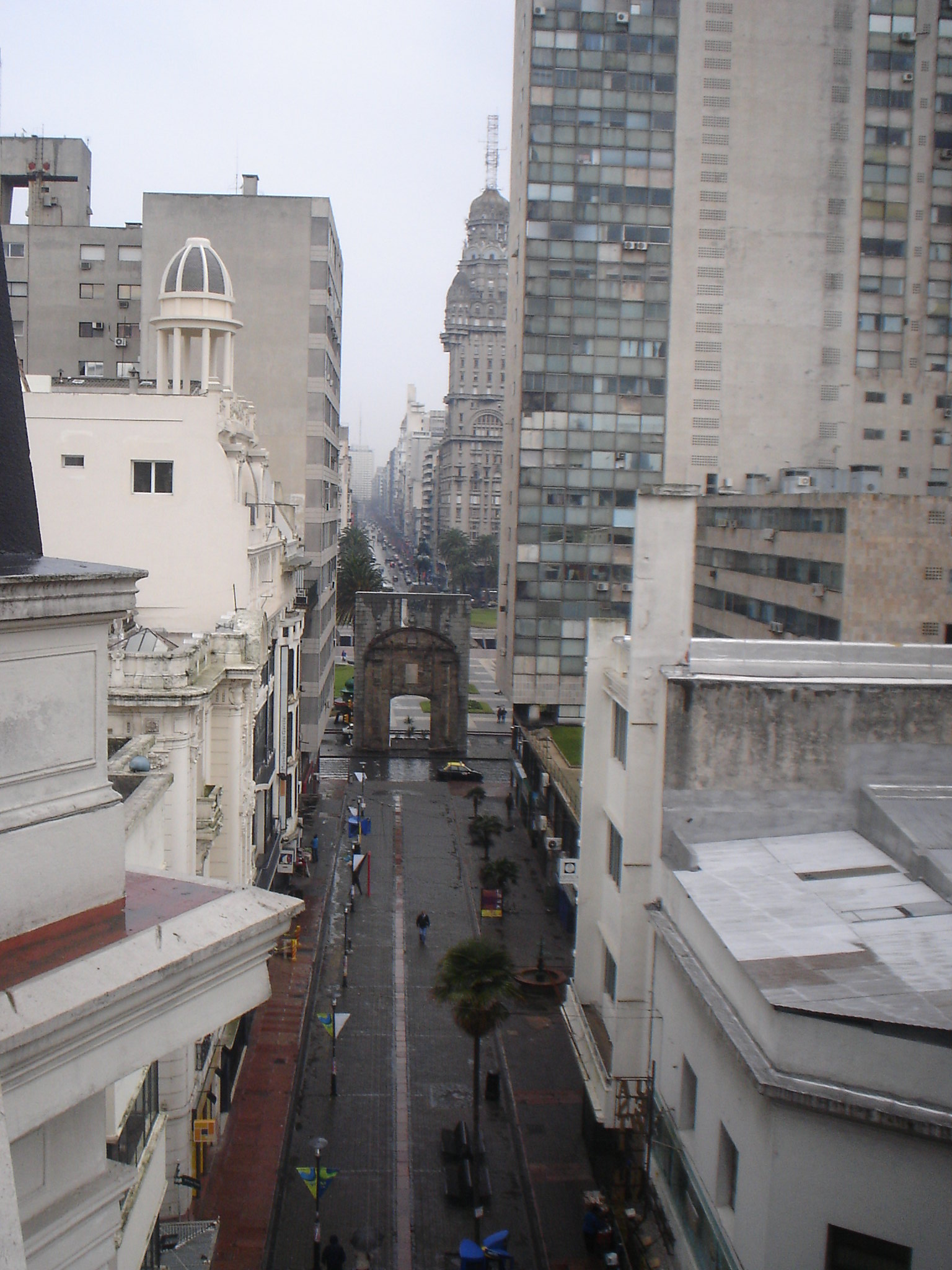 Puerta de la Ciudadela, Montevideo